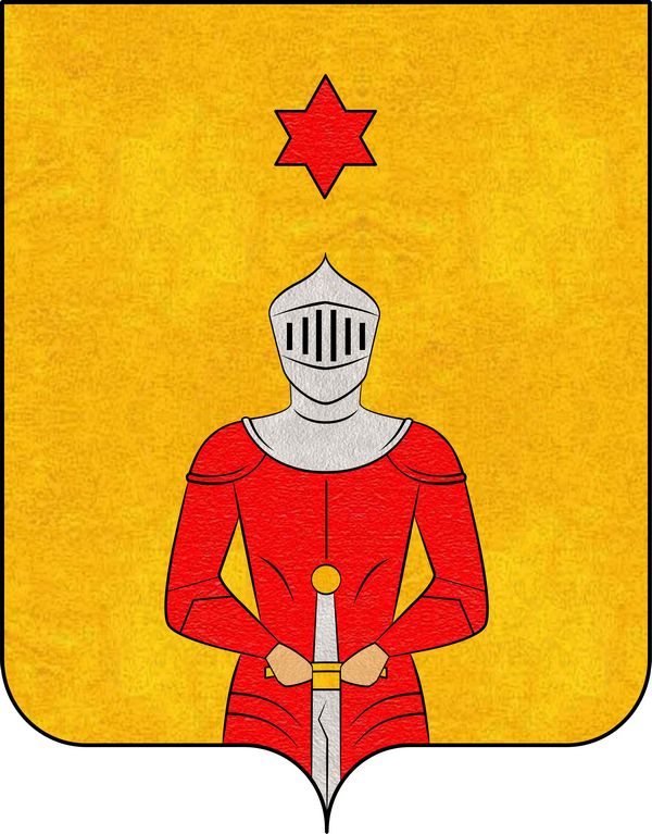 Guerriero armato di tutte pezze di argento loricato di rosso in maestà poggiante con le due mani di carnagione sull'elsa di una spada su oro con in capo una stella a sei raggi di rosso su oro.